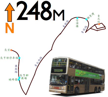 中文（香港）: 九巴248M線的走線圖